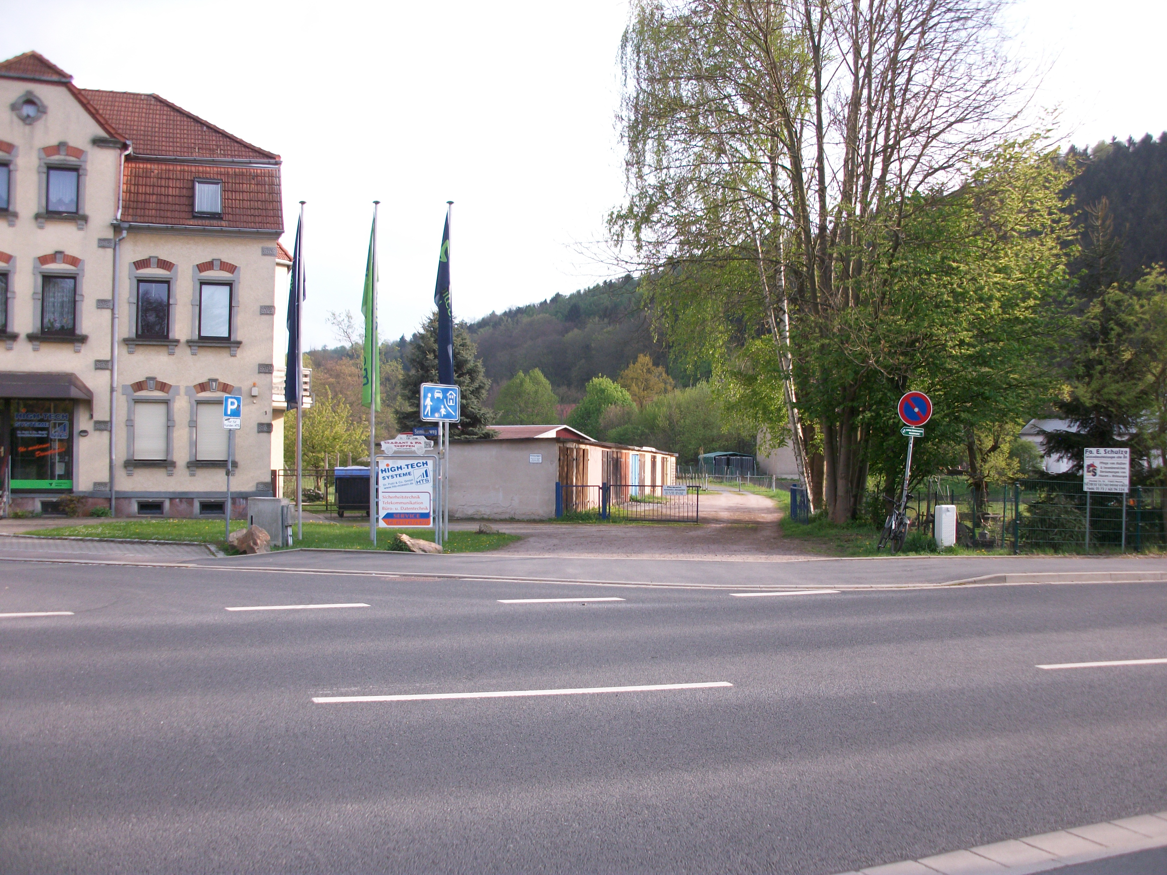 Ehemaliger Haltepunkt Nossen (2017)